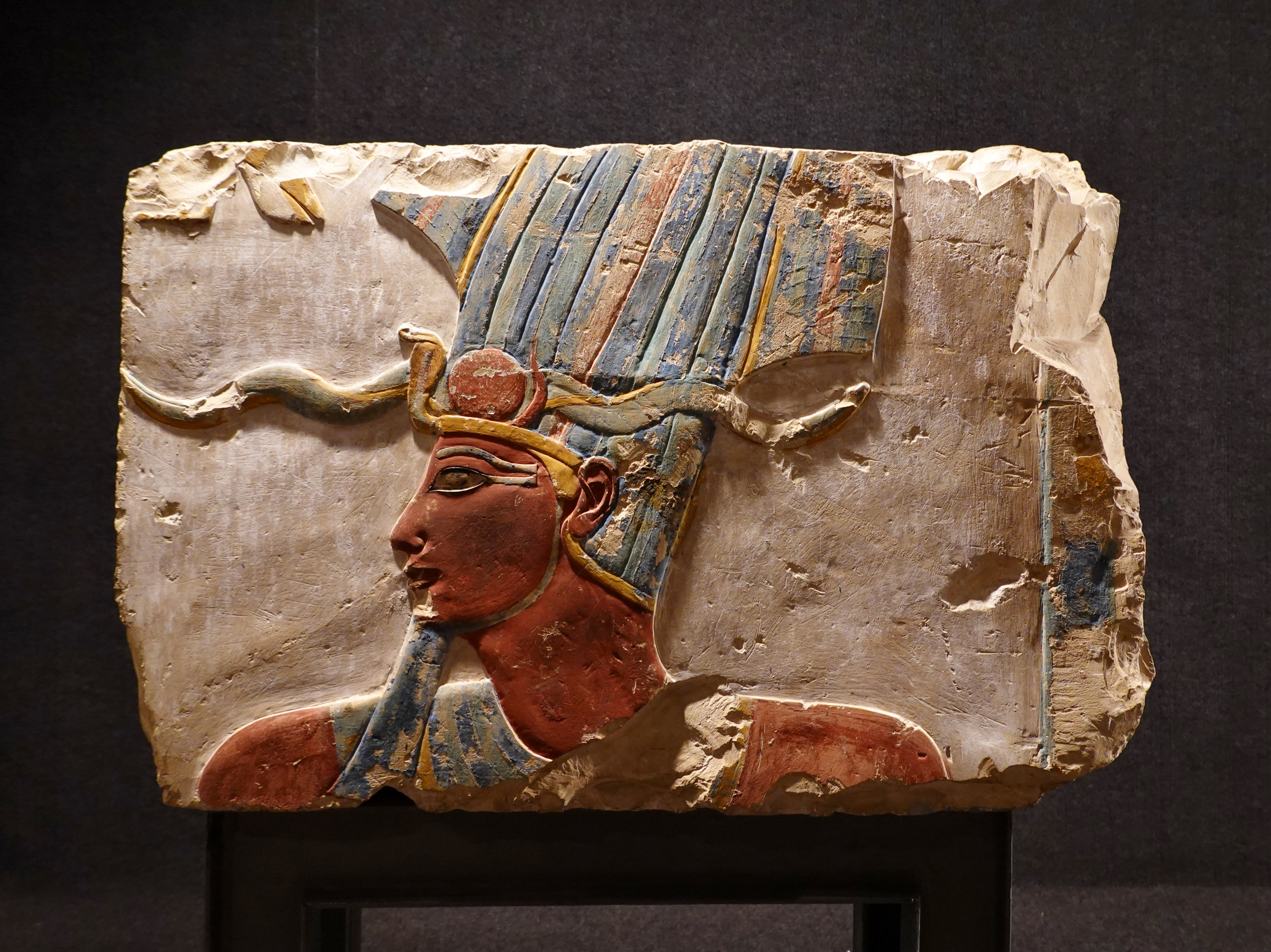 Relief des Königs Thutmosis III. mit Atef-Krone (Kalkstein, 18. Dynastie), gefunden in Deir el-Bahari, ausgestellt im Luxor-Museum, Ägypten